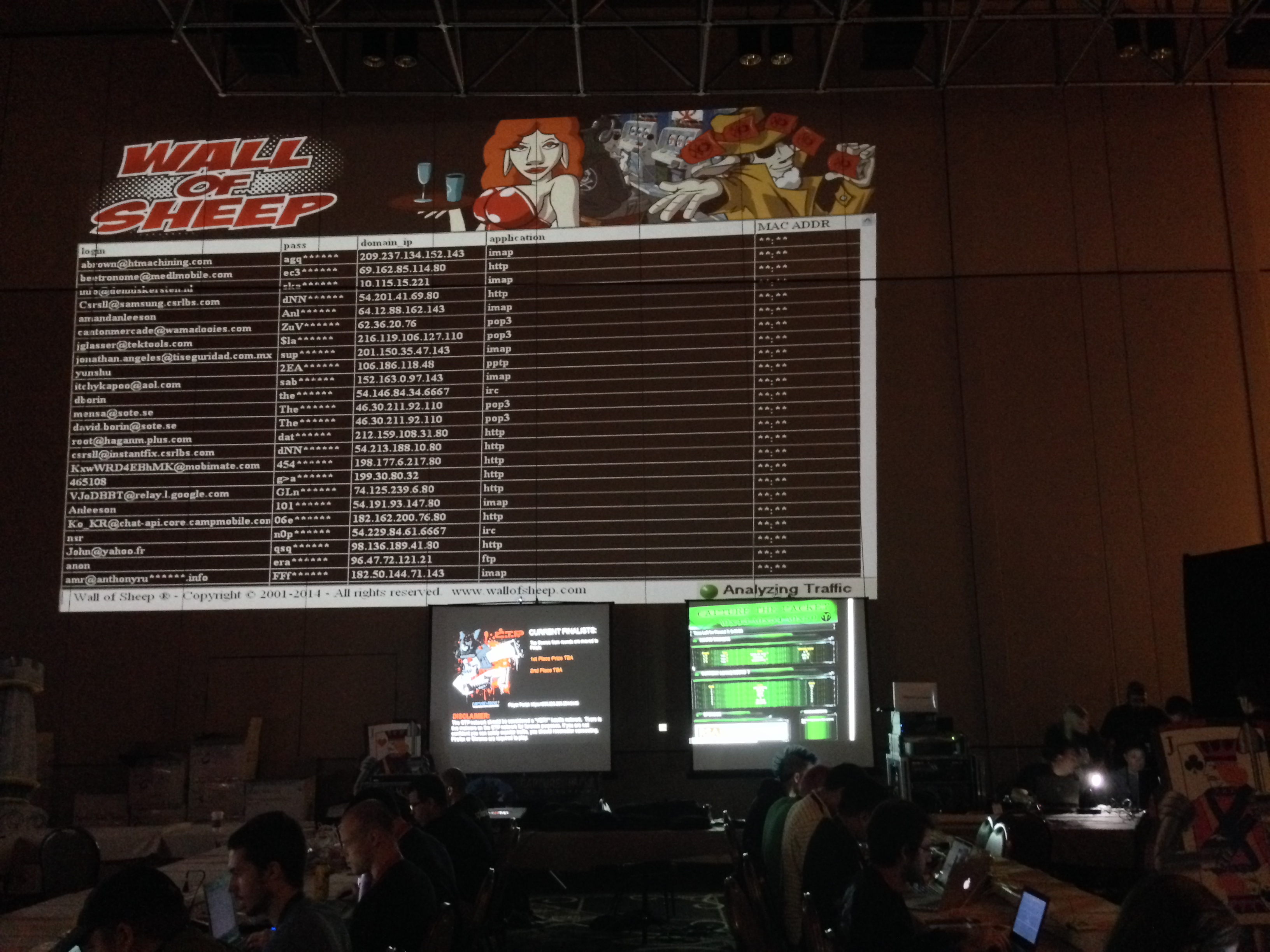 mobile